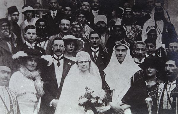 ירושלים - חתונת אדוין סמואל עם יהודית גרזובסקי (גור), לידו - הנציב העליון אבא הרברט סמואל